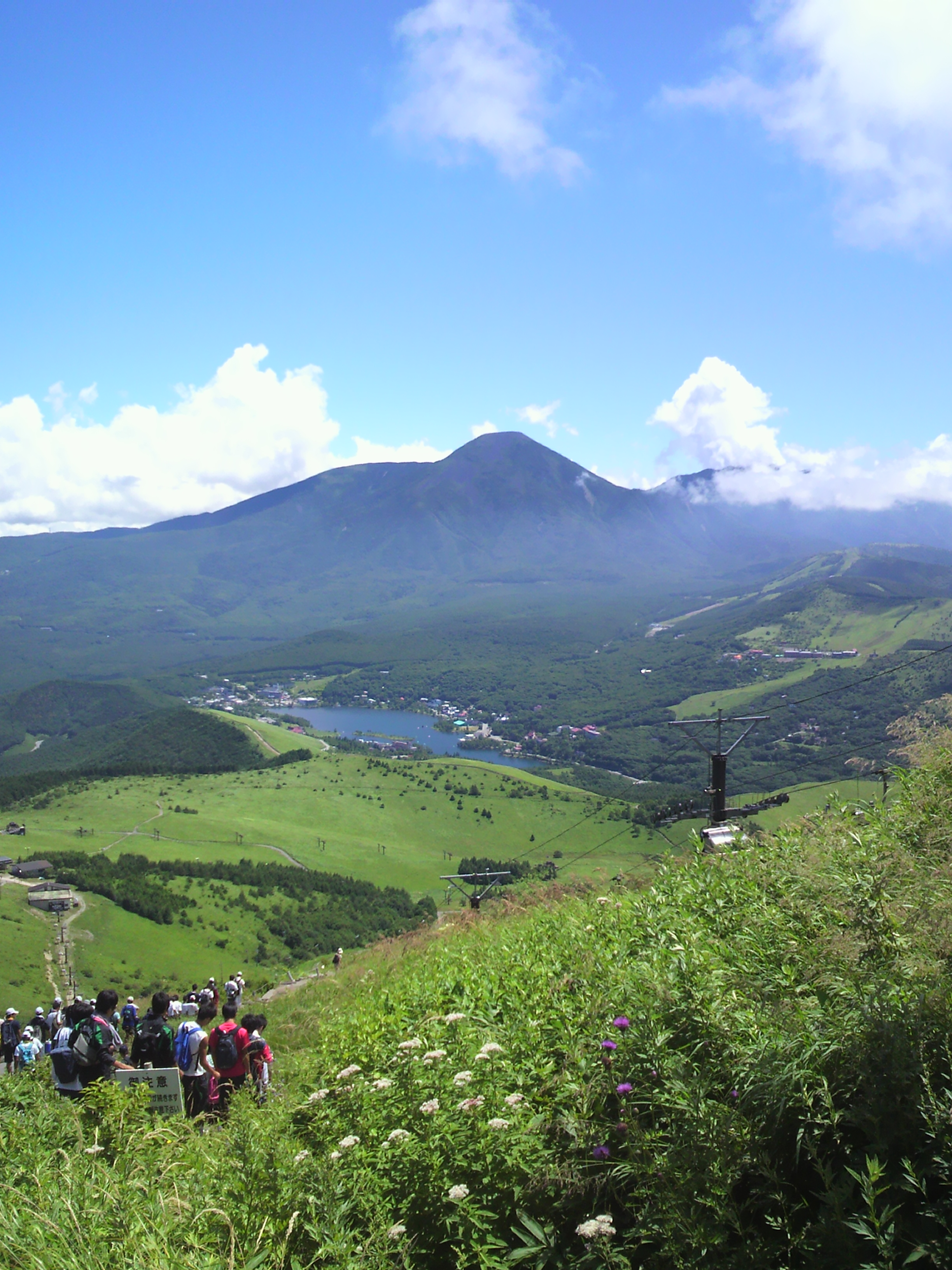 Kitayama, Chino, Nagano Prefecture 391-0301, Japan